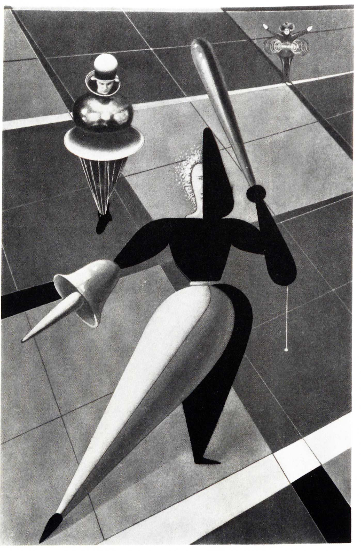 Oskar Schlemmer Triadisches Ballett